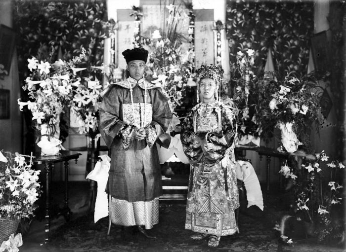 Negatif. Sepasang mempelai dengan kostum tradisional Tionghoa di Salatiga, Jawa Tengah.